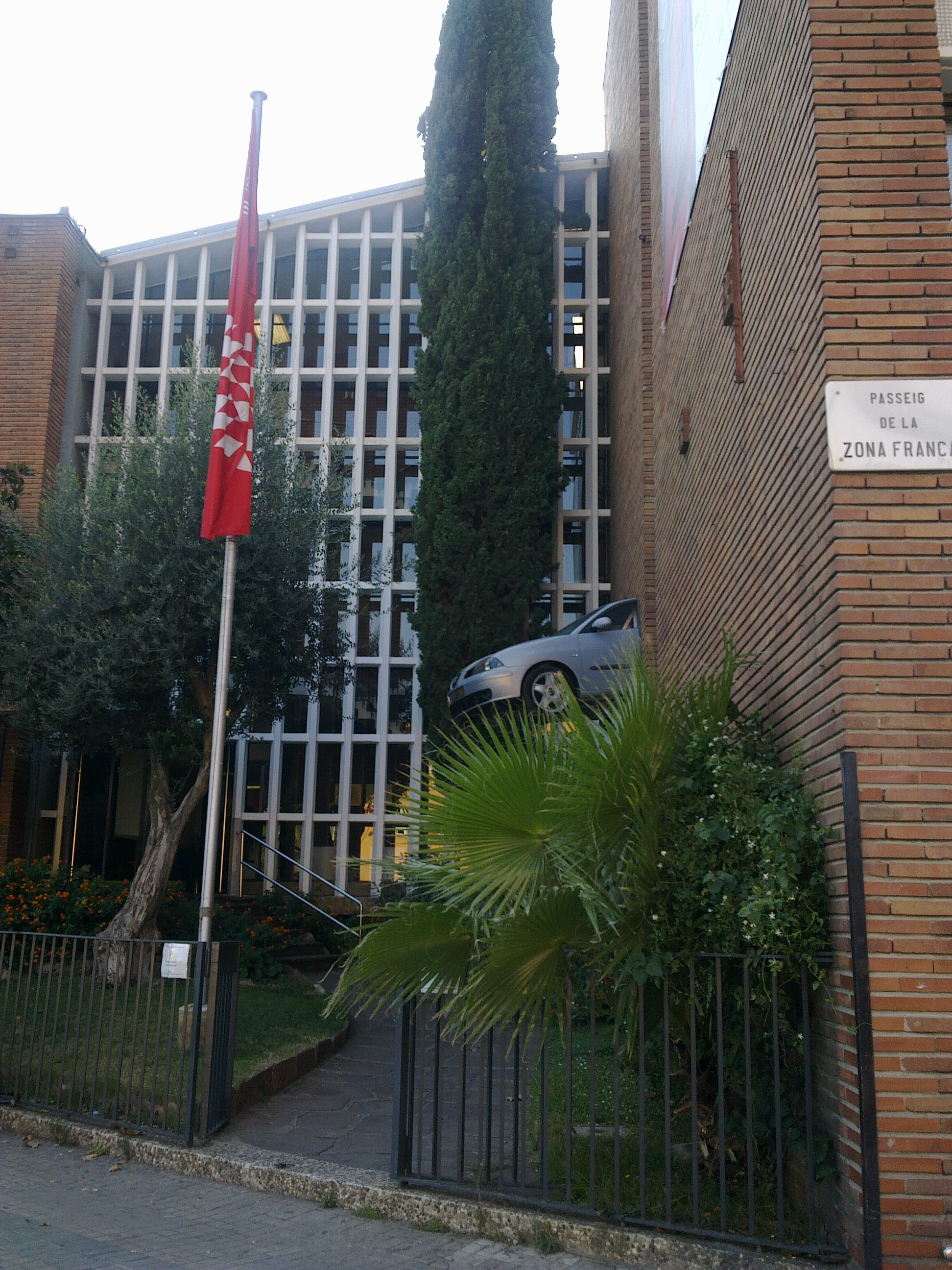 Centre de Formació de la Seat, situat al passeig de la Zona Franca (no confondre amb la fàbrica de Zona Franca) Barcelona